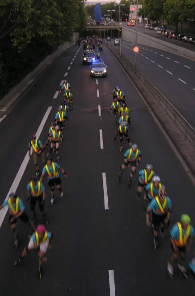 Karlsruher SkateNite: Ordner, Polizei und Lautsprecherwagen